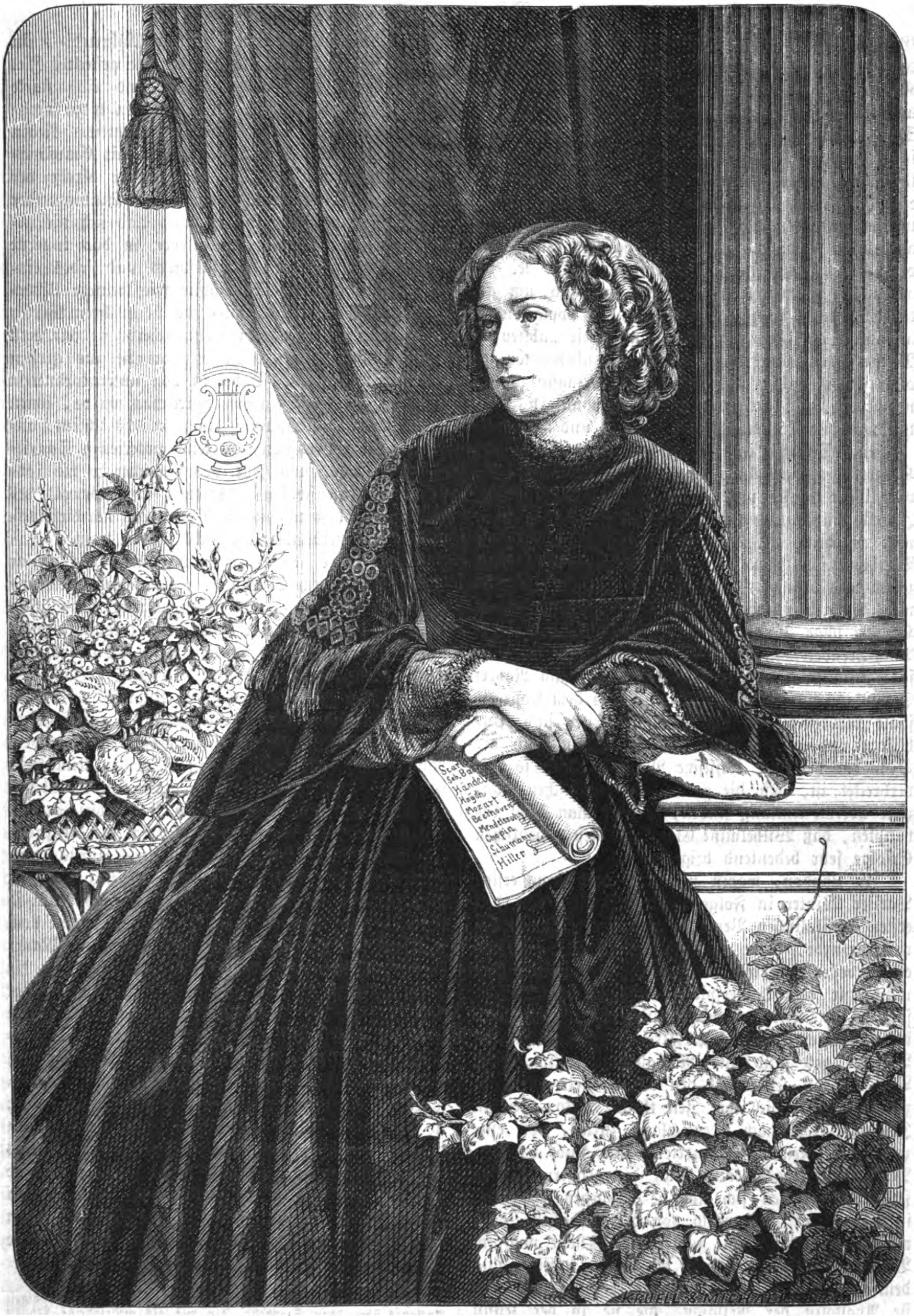 Wilhelmine Clauss-Szarvady, deutsch-böhmische Pianistin im 19. Jh.